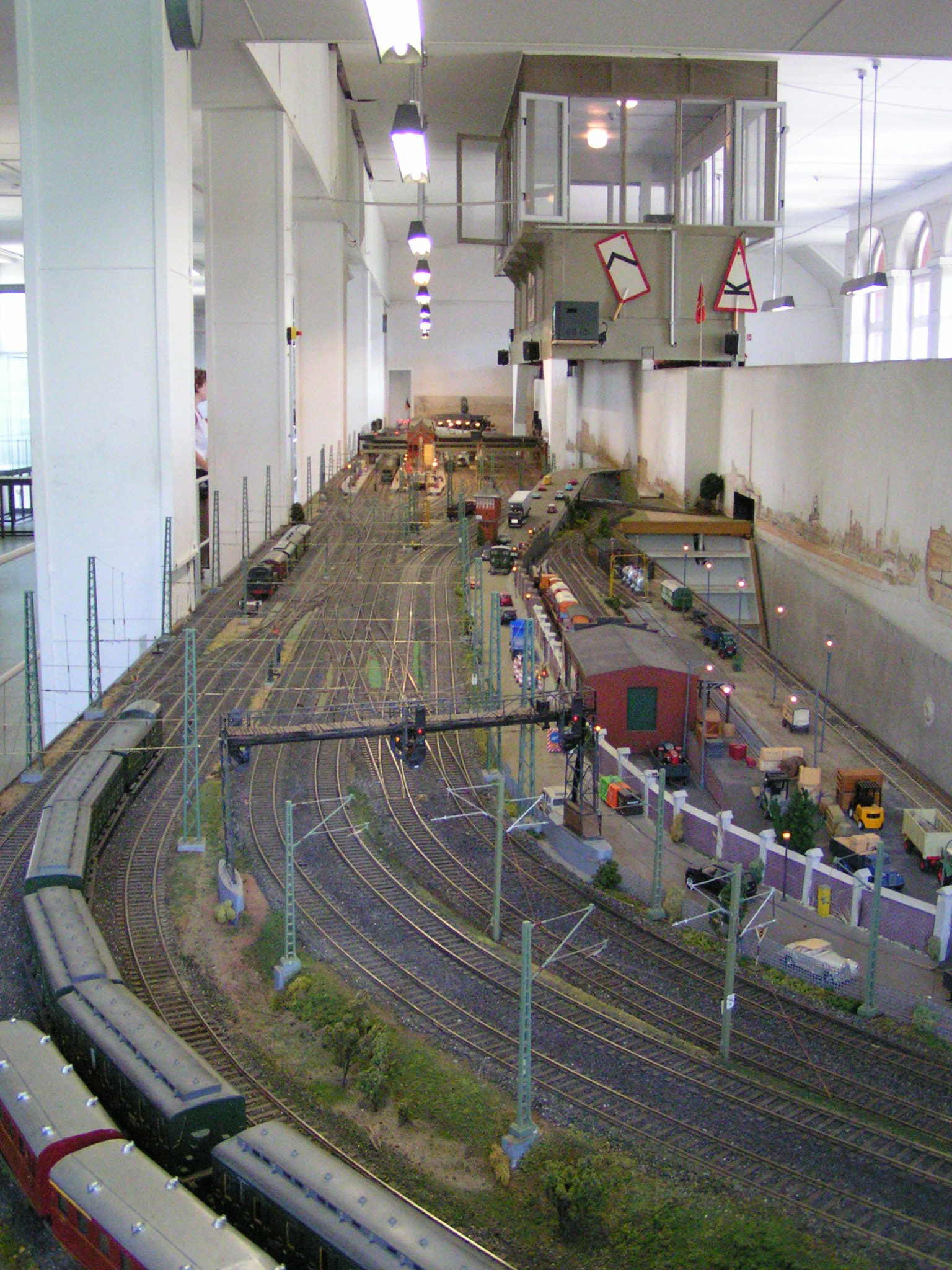 Model railroad at Museum für Hamburgische Geschichte, Hamburg, Germany